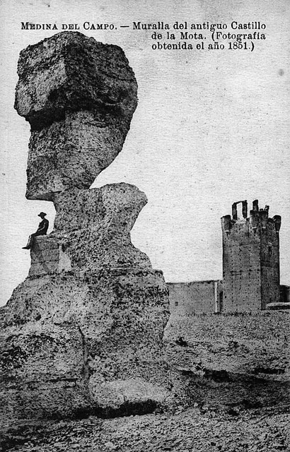 Castillo de la Mota - Medina del Campo (Valladolid) - Casa Luis Saus - Madrid. Papelería Ricardo Sendino. Réplica en postal de fotografía obtenida en el año 1851. Muralla del antiguo de la Mota. - Tarjeta postal. Papel 89 x 140 B/N